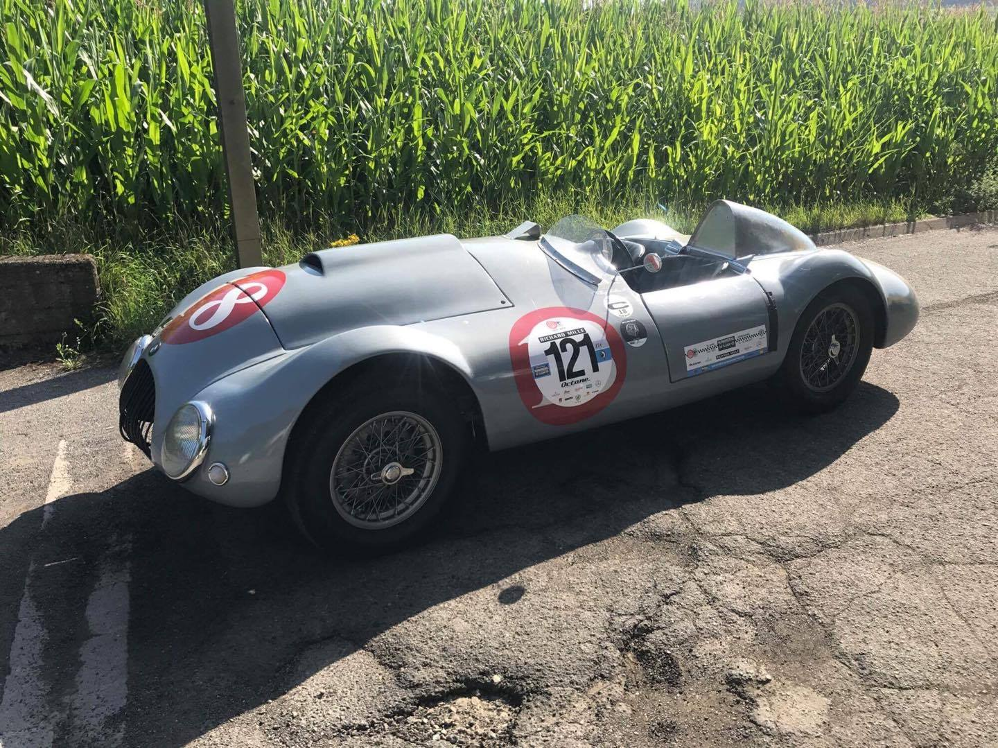 Wagner BMW 328 Spezial Eegekonstruktioun vum Honoré Wagner